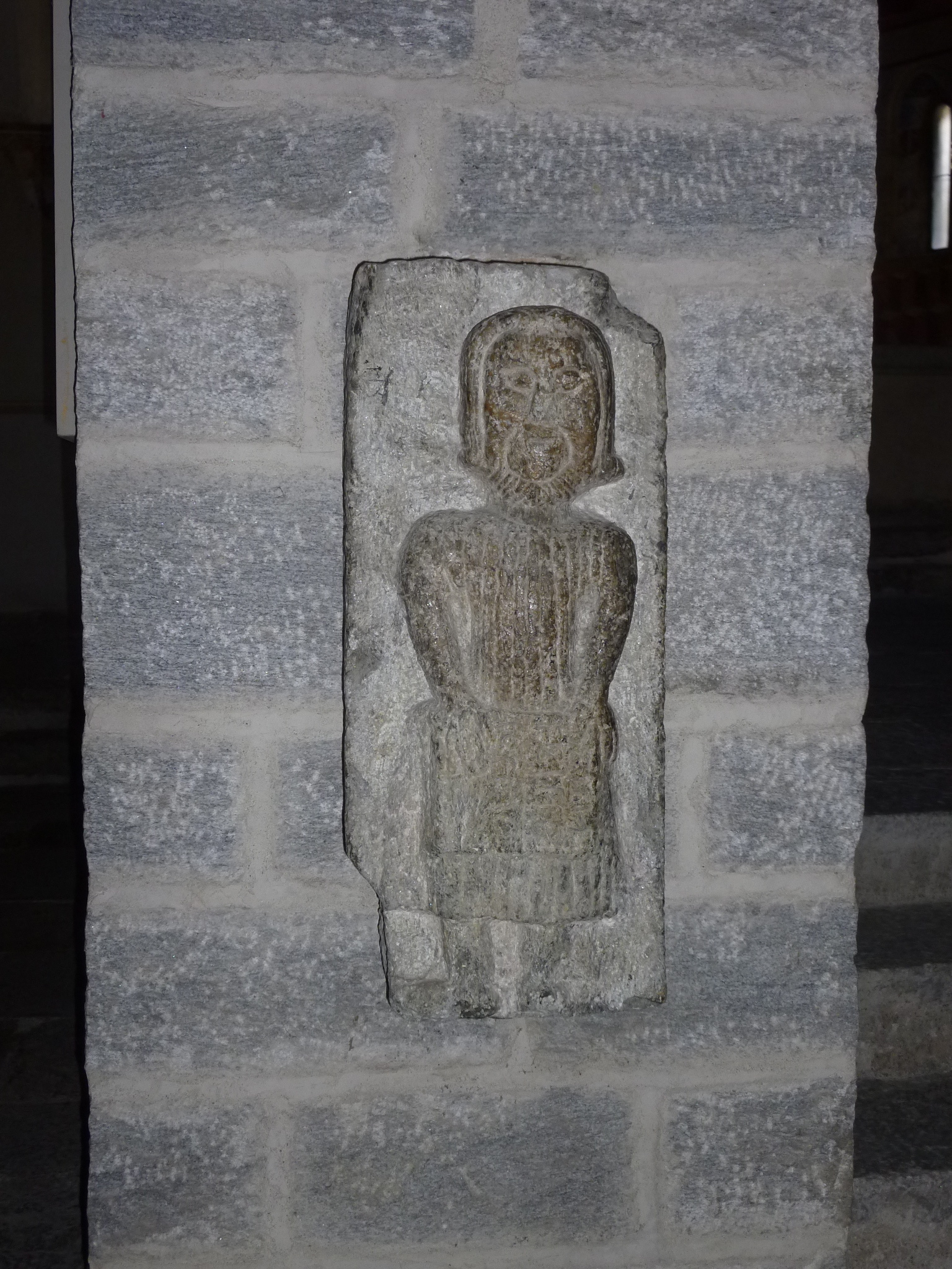 Kirche San Pietro e Paolo (Biasca) Figur